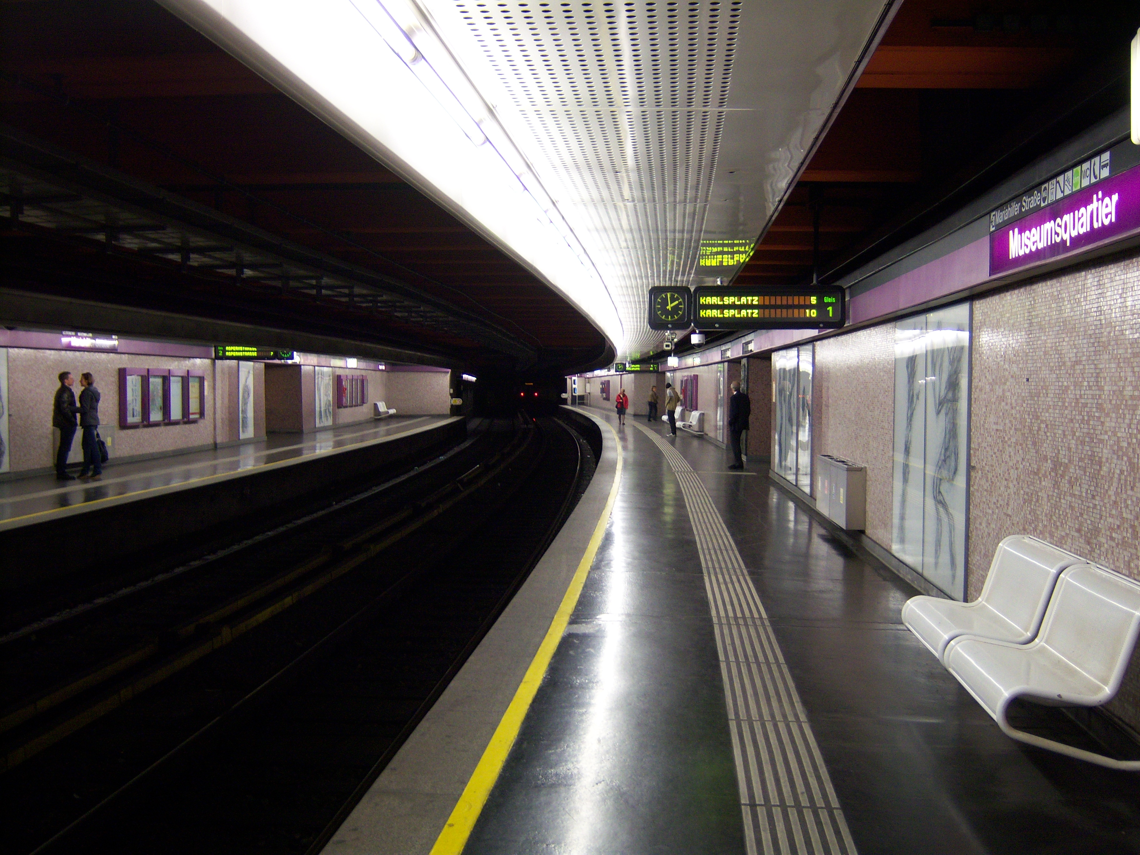 U-Bahn-Station Museumsquartier